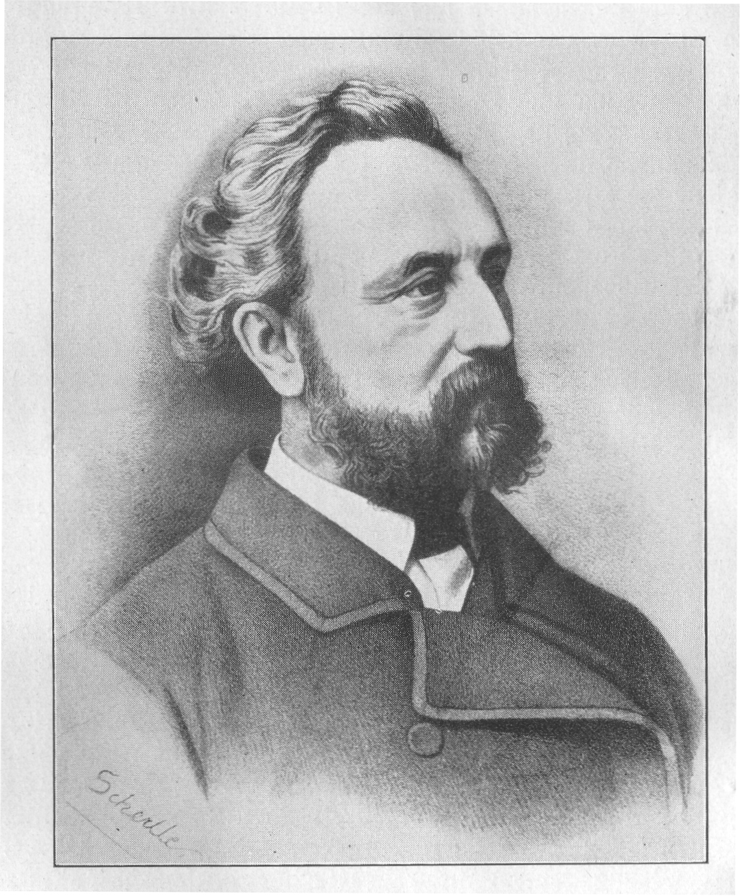 Robert Gerwig (1820-1885)